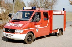 Tragkraftspritzenfahrzeug (TSF) mit Kofferaufbau (Baujahr 1999)